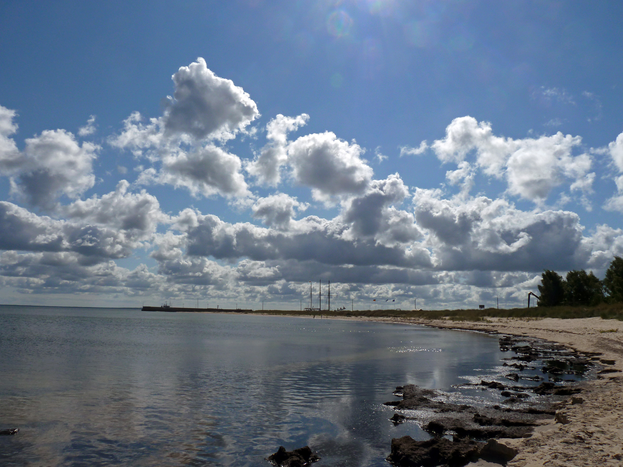 Der Hafen von Lehtma, Estland